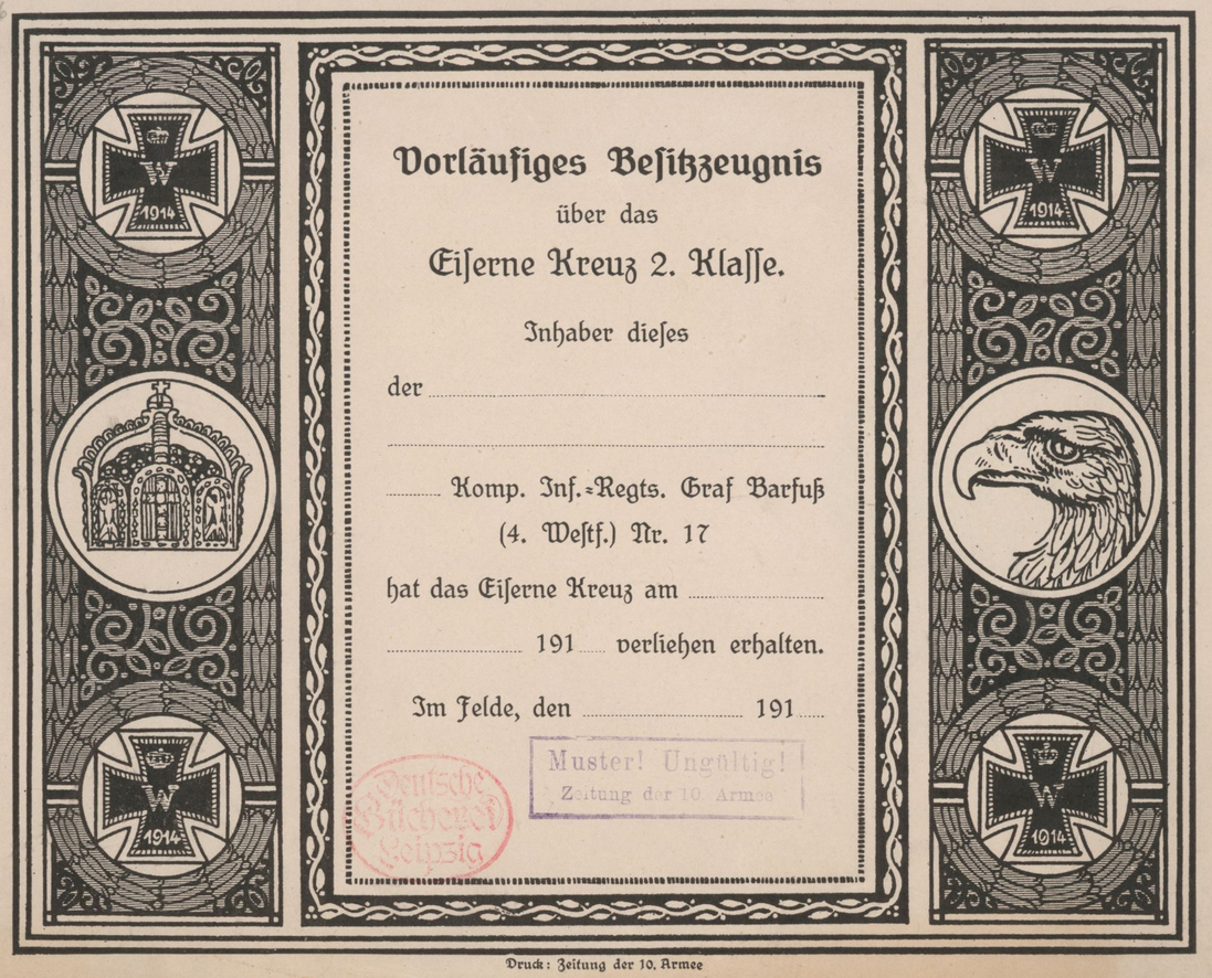 Свидетельство о вручении Ордена Железного Креста 2-й степени